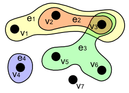 Hypergraph sample